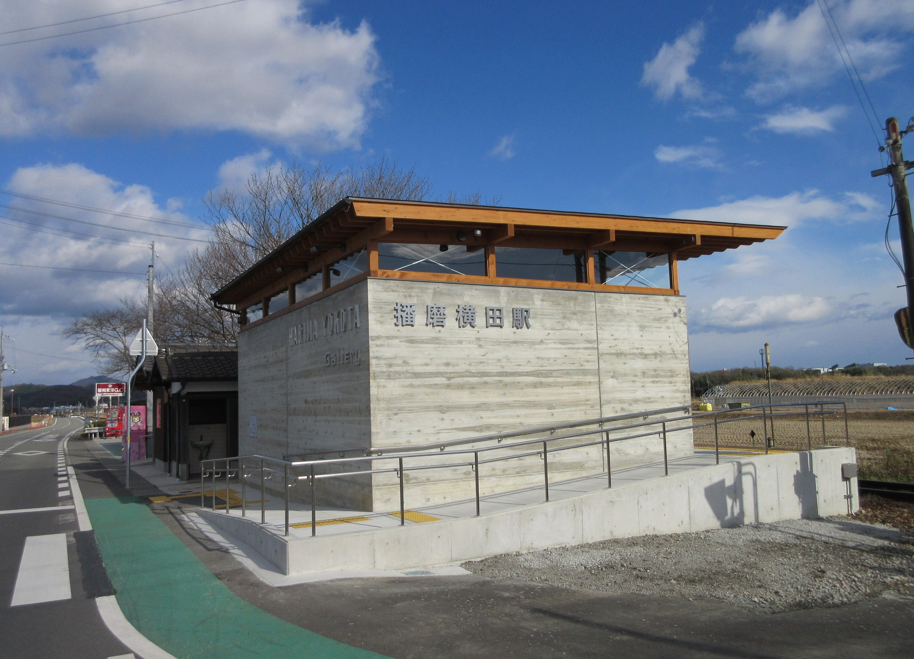 播磨横田駅